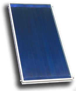 Солнечный коллектор "Сокол" российского производства, с оптическим, многослойным, селективным покрытием. Средний КПД коллектора - 75%.